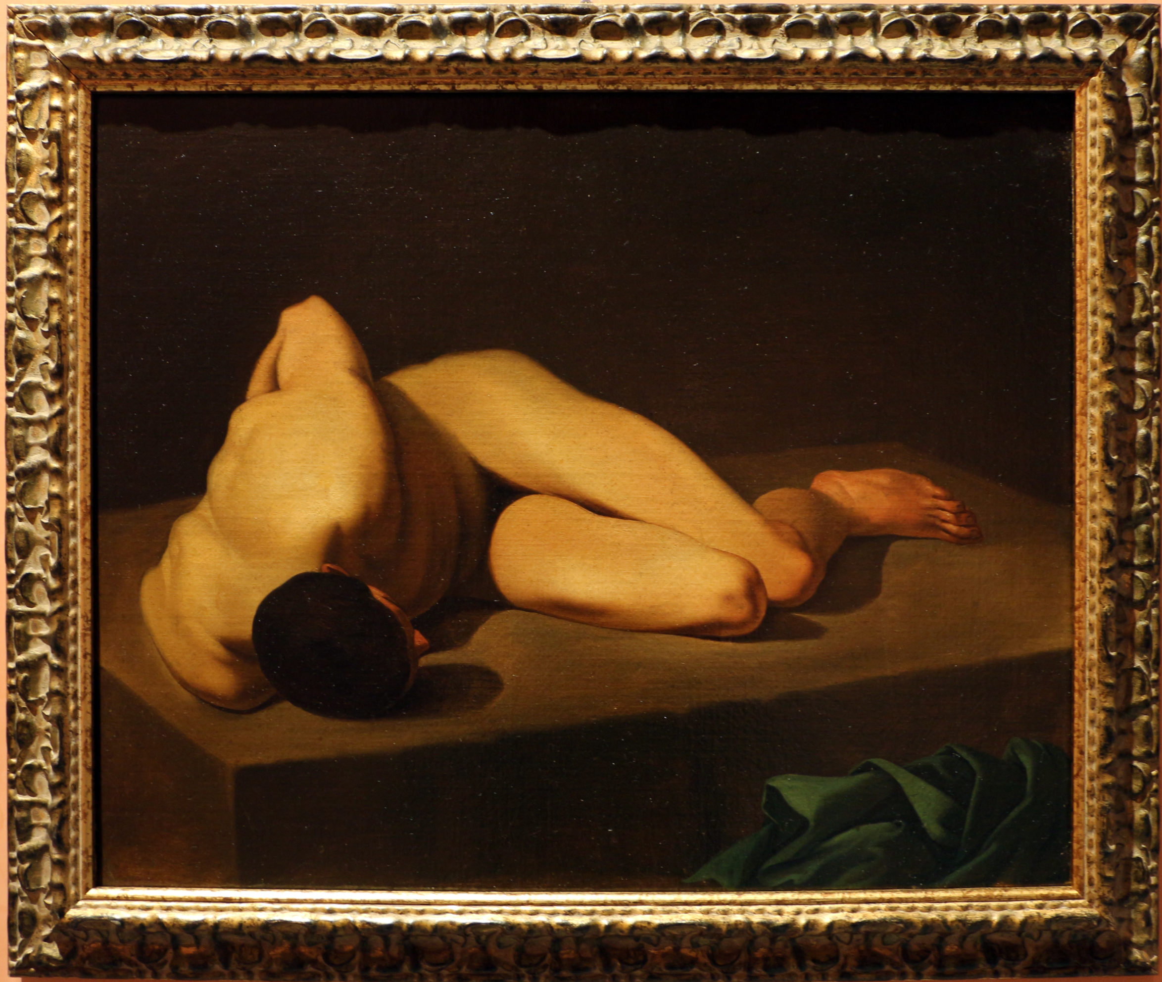 Pinacoteca civica di Reggio Calabria - paintings This is a photo of a monument which is part of cultural heritage of Italy.